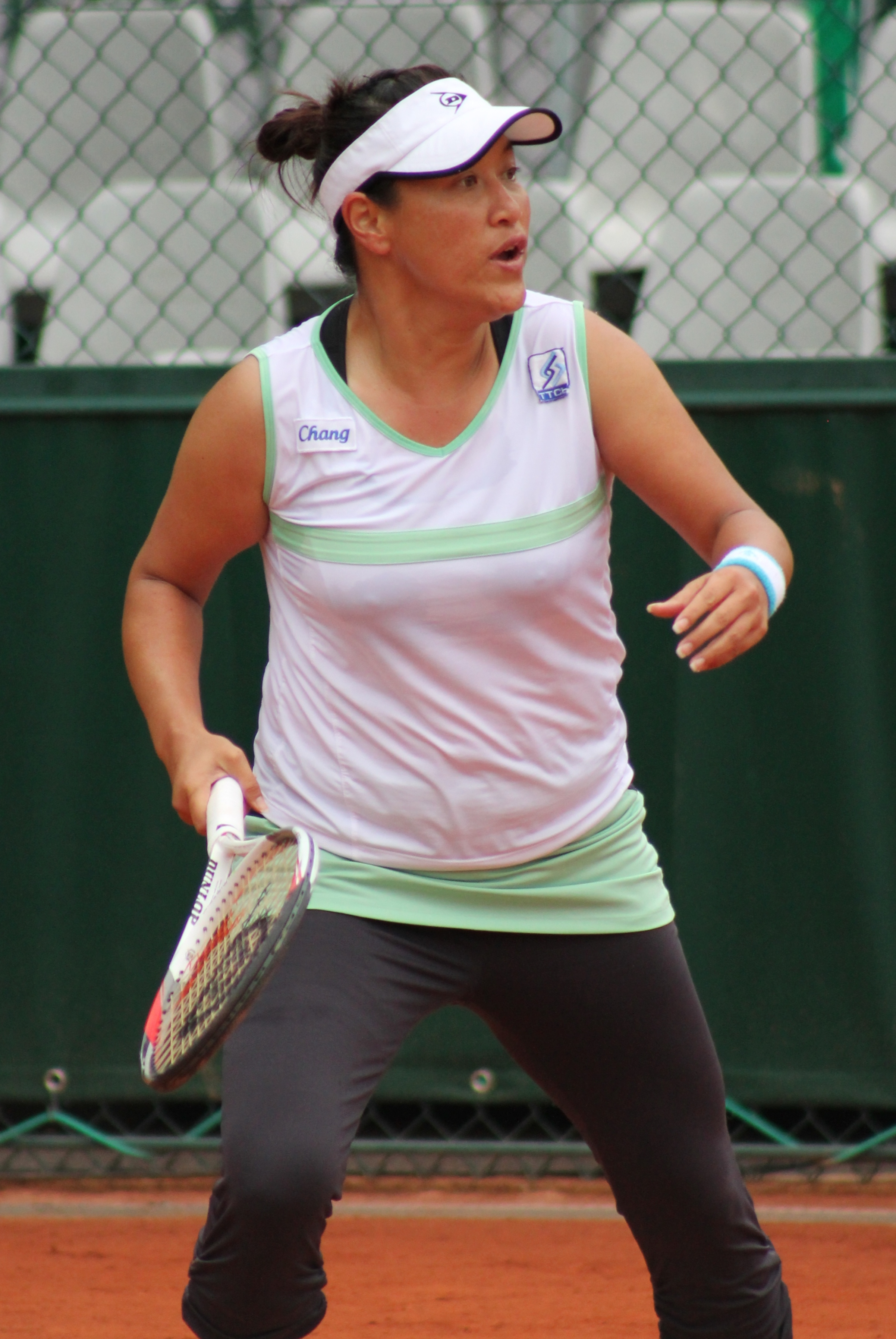 Tanasugarn RG13 (8)